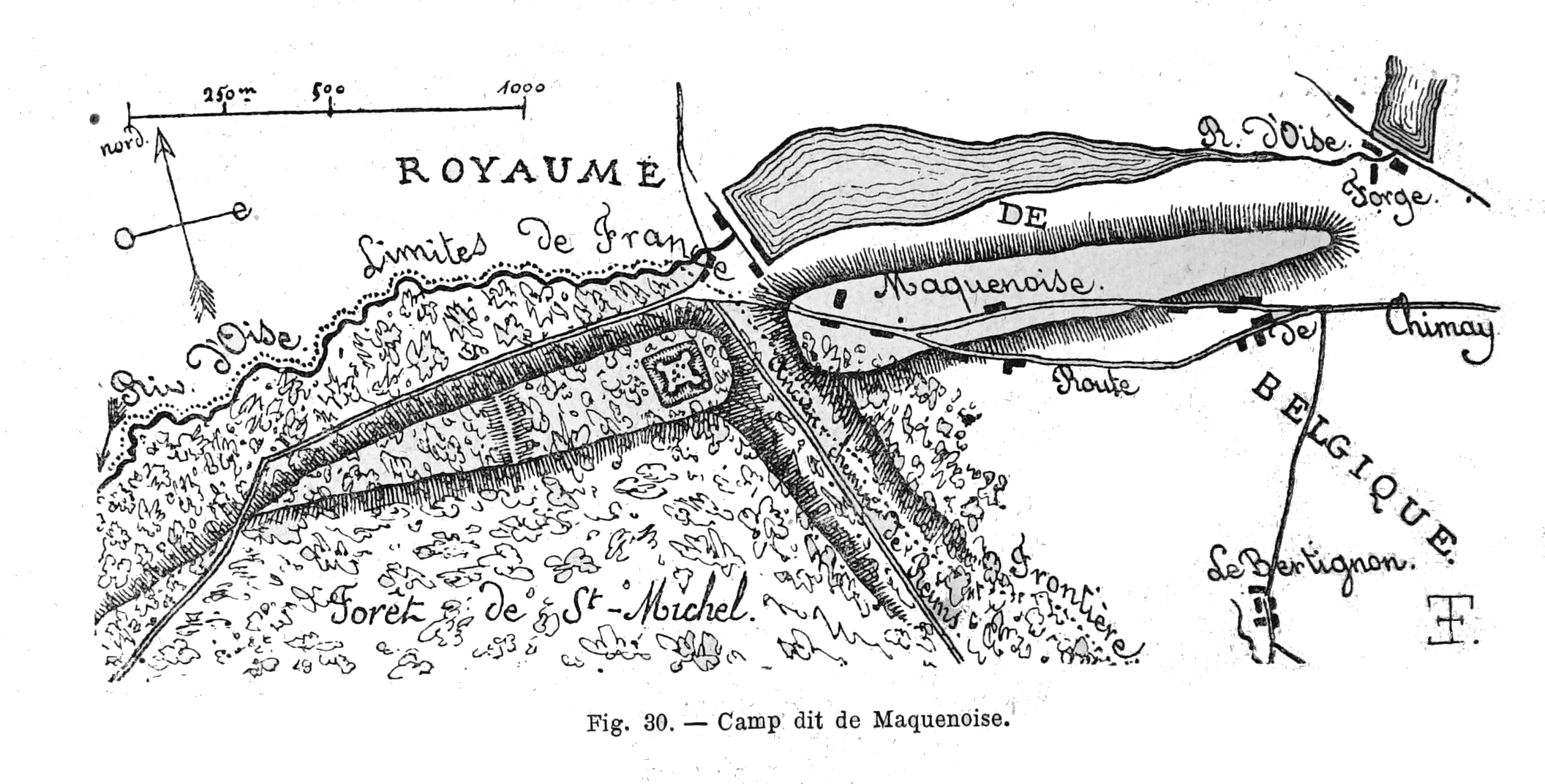 par un dessin de Fleury.